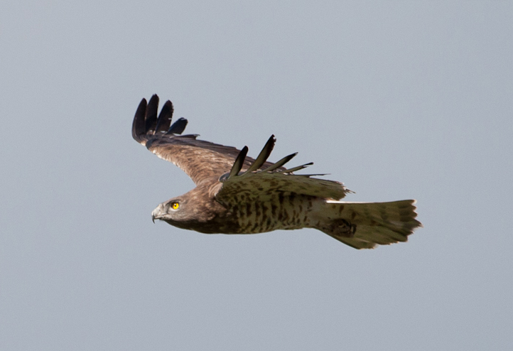 Aguila Culebrera Circaetus gallicus justo despues de cruzar el Estrecho de Gibraltar. Punta Carnero, Andalusia, Spain.